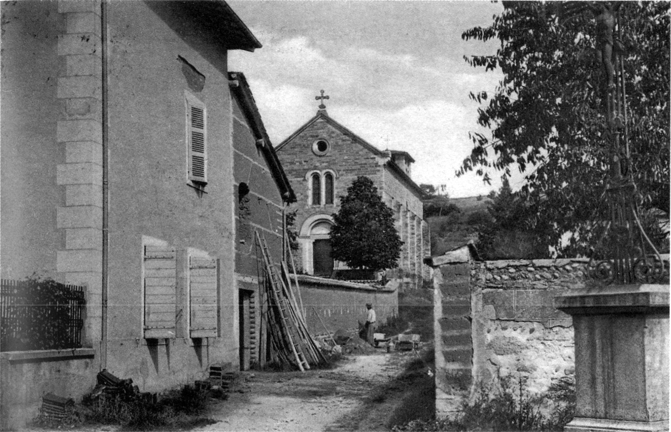 Luzinay, l'église en 1907